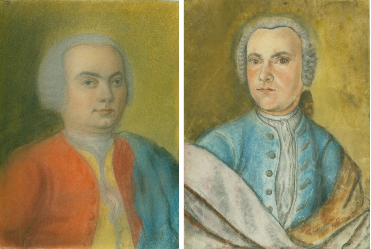 Links: Nicolaus Ephraim Bach: "Carl Philipp Emanuel Bach", ca. 1733 Rechts: Gottlieb Friedrich Bach: "Wilhelm Friedemann Bach", ca. 1725